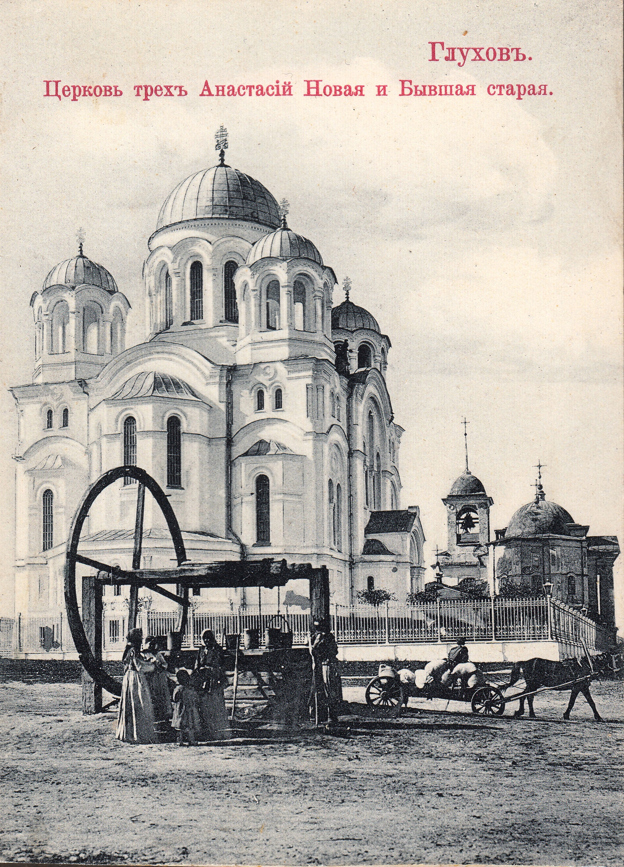 Трьоханастасіївська та Анастісївська церкви (східний фасад) до 1897 року